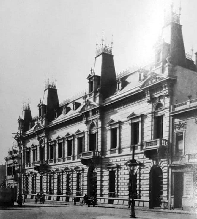 Aqui podemos observar como estaba compuestas las calles de la av cerrito y la mansion que depues va a llegar a formar parte de la sede del Jockey club de Buenos Aires